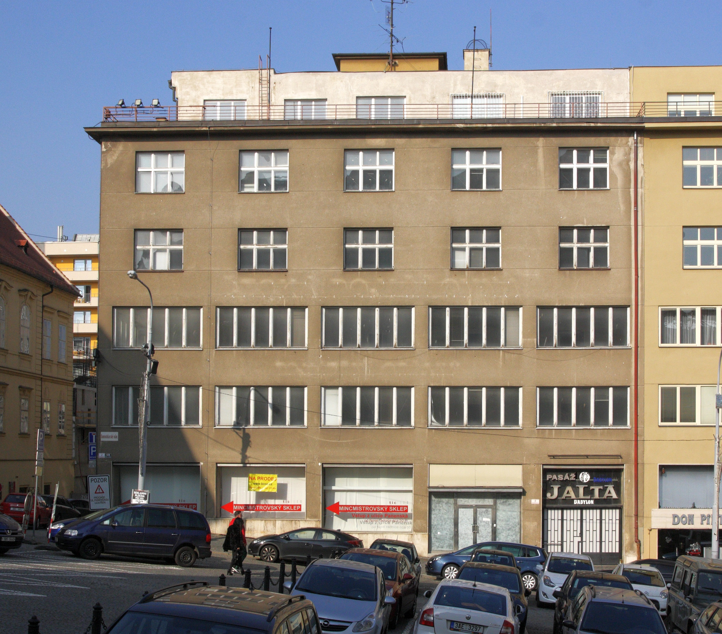 Brno - Dominikánské náměstí, pasáž Jalta.